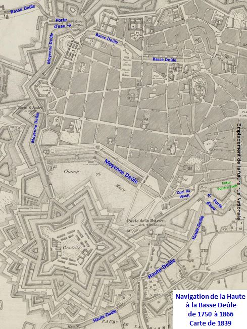 Travail personnel d'après Plan de la ville et des environs de Lille : 9e époque, en 1708 / par Brun-Lavainne ; dessiné sur pierre par Duhem cadet - 1833 Auteur L. Danel ( Lille ). Lithographe Sujet Lille -- 1708 Éditeur L. Danel ( Lille ) Gallica Bibliothèque numérique